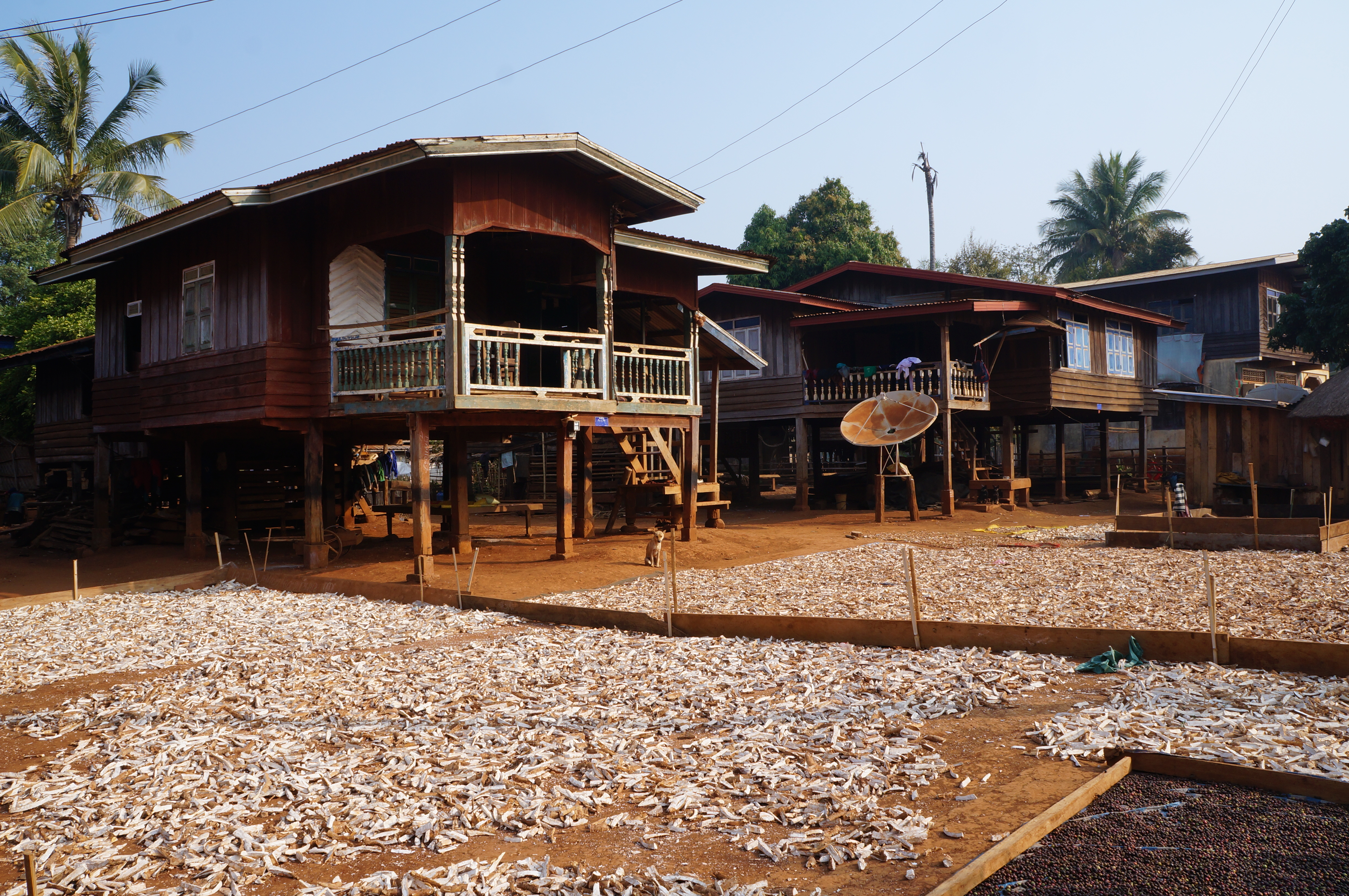 Dans les villages du Plateau des Bolovens Laos